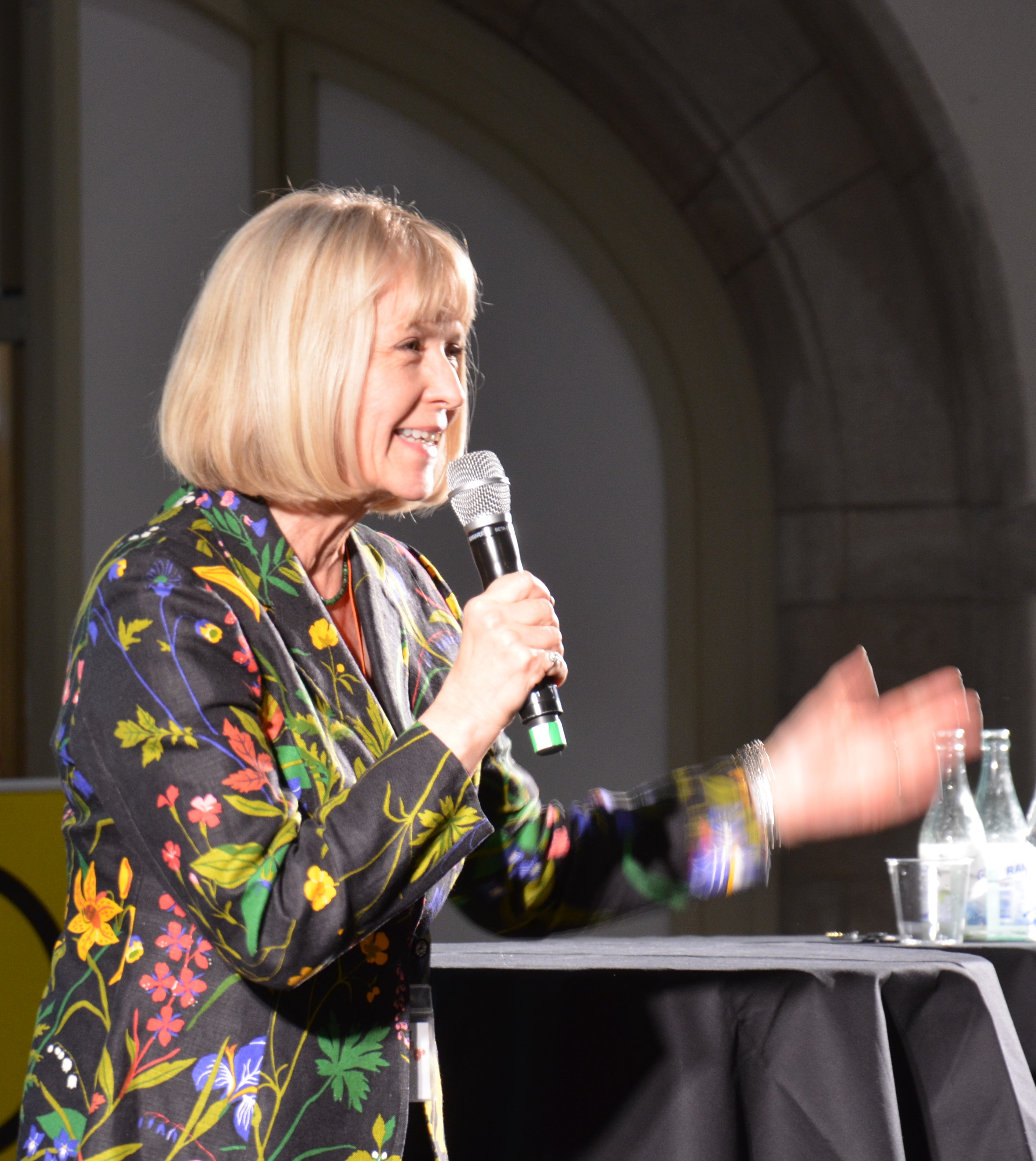 Christina Mattsson, director of Nordiska museet in Stockholm, Sweden, at the annual meeting of Svenska Museiföreingen, Nordiska museet, May 15, 2013